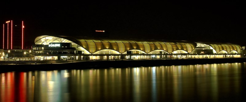 Rhein-Galerie bei Nacht.